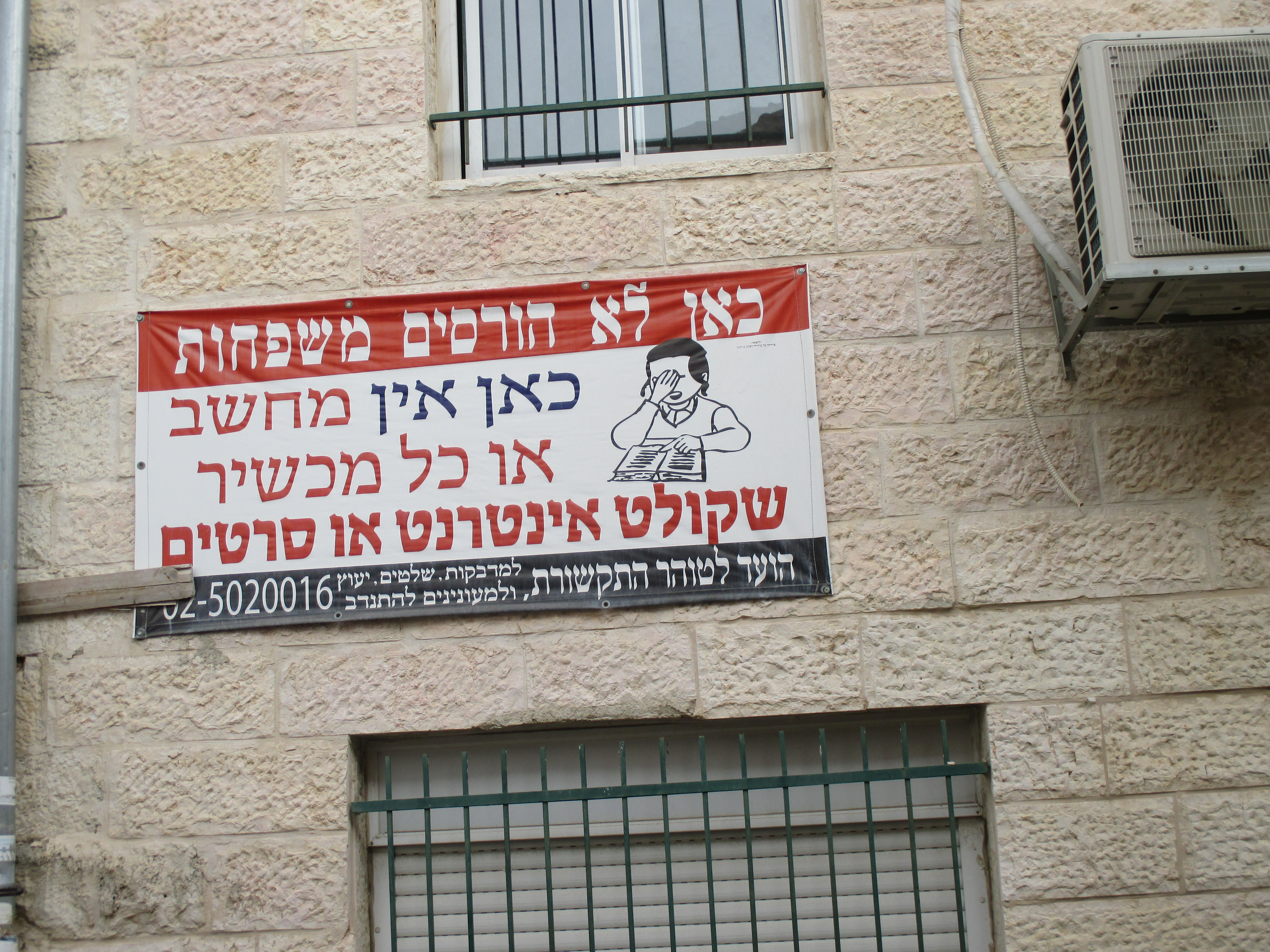 כרזה בשכונה חרדית בירושלים נגד האינטרנט והסרטים